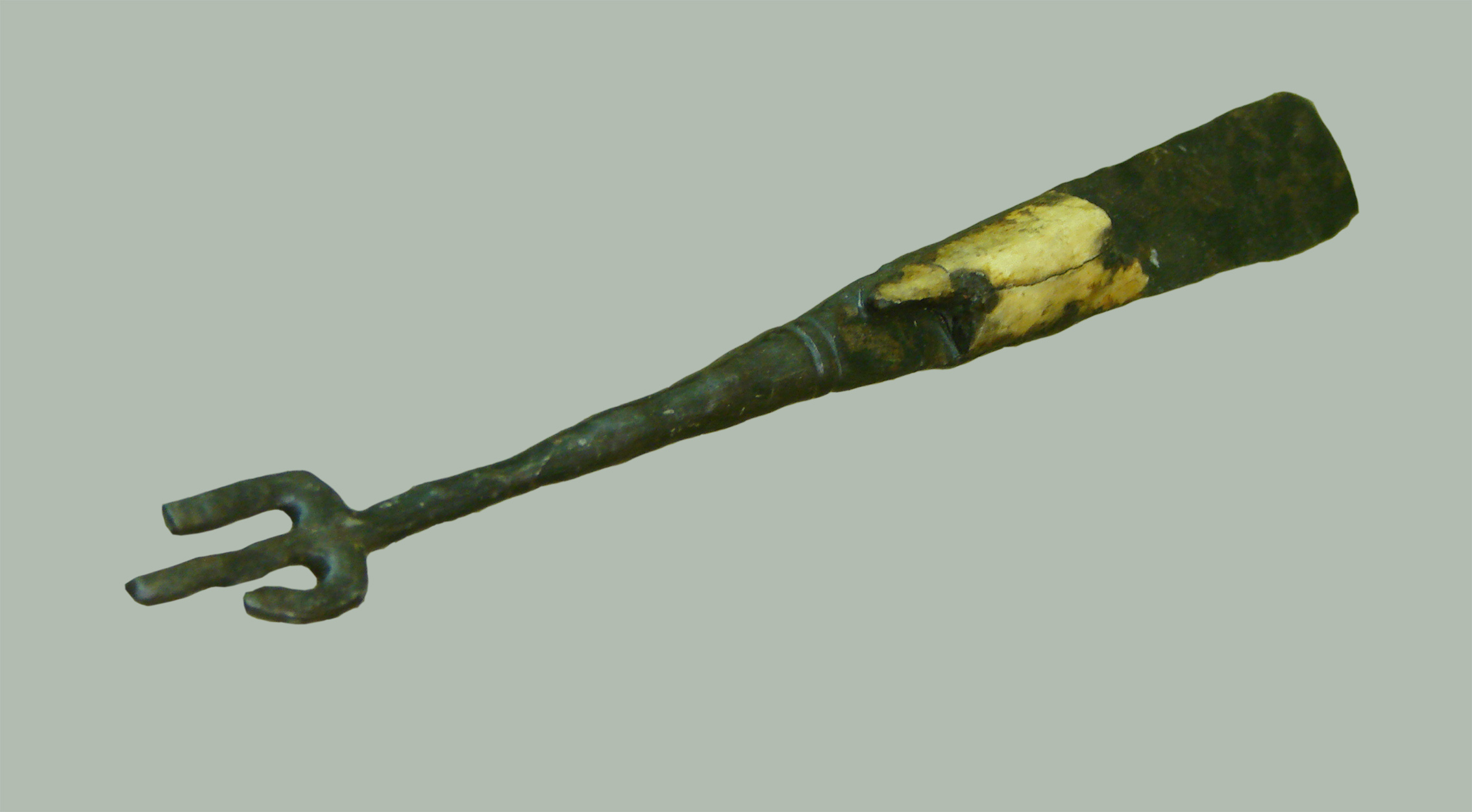 Fourchette, fer et os, 16ème siècle. Musée de Laon.